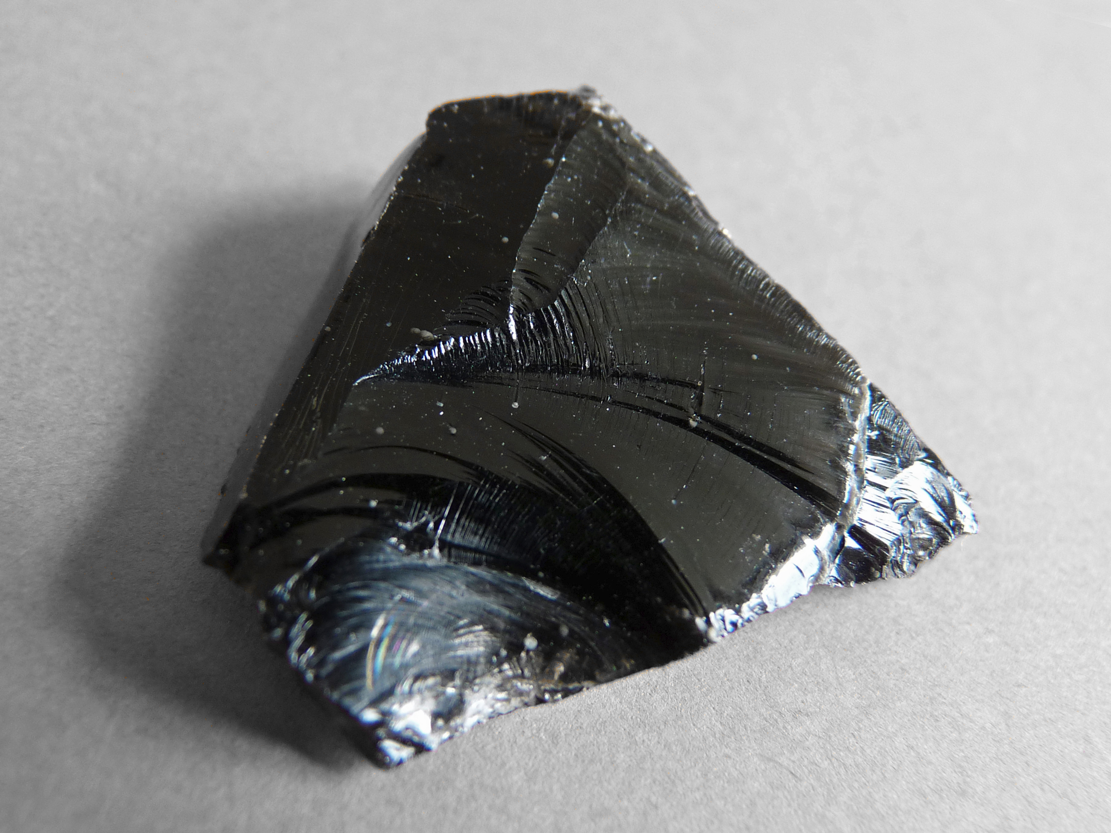 Echantillon d'obsidienne récolté près du Monte Pilato, dans l'île de Lipari (îles Eoliennes, Sicile). Dimensions : env. 3 cm.